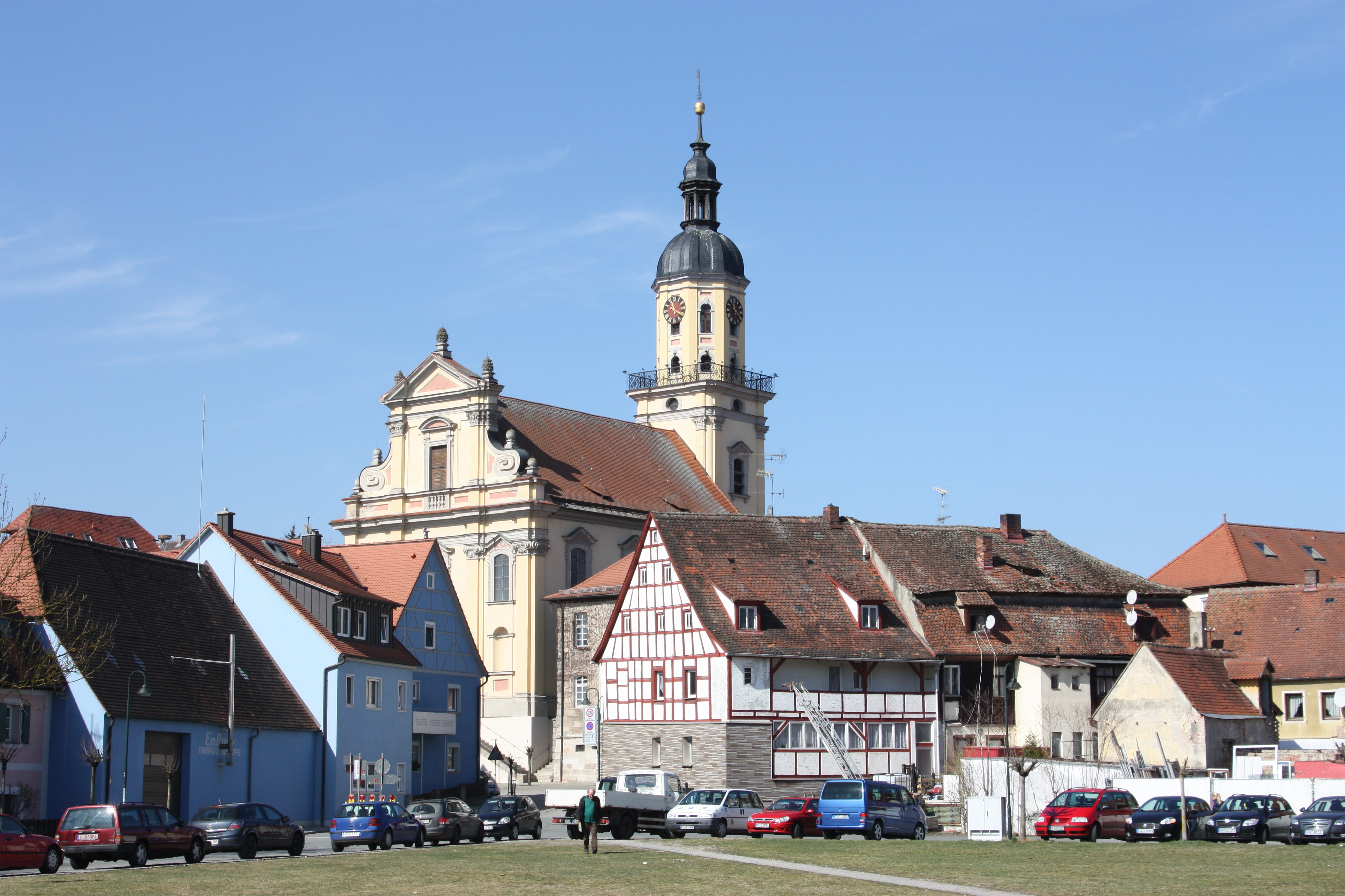 Wilhermsdorf Ortsmitte